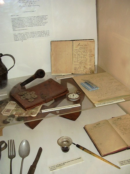 Accessoires de galvacher à la Maison des Galvachers à Anost (Saône-et-Loire, Morvan, France)